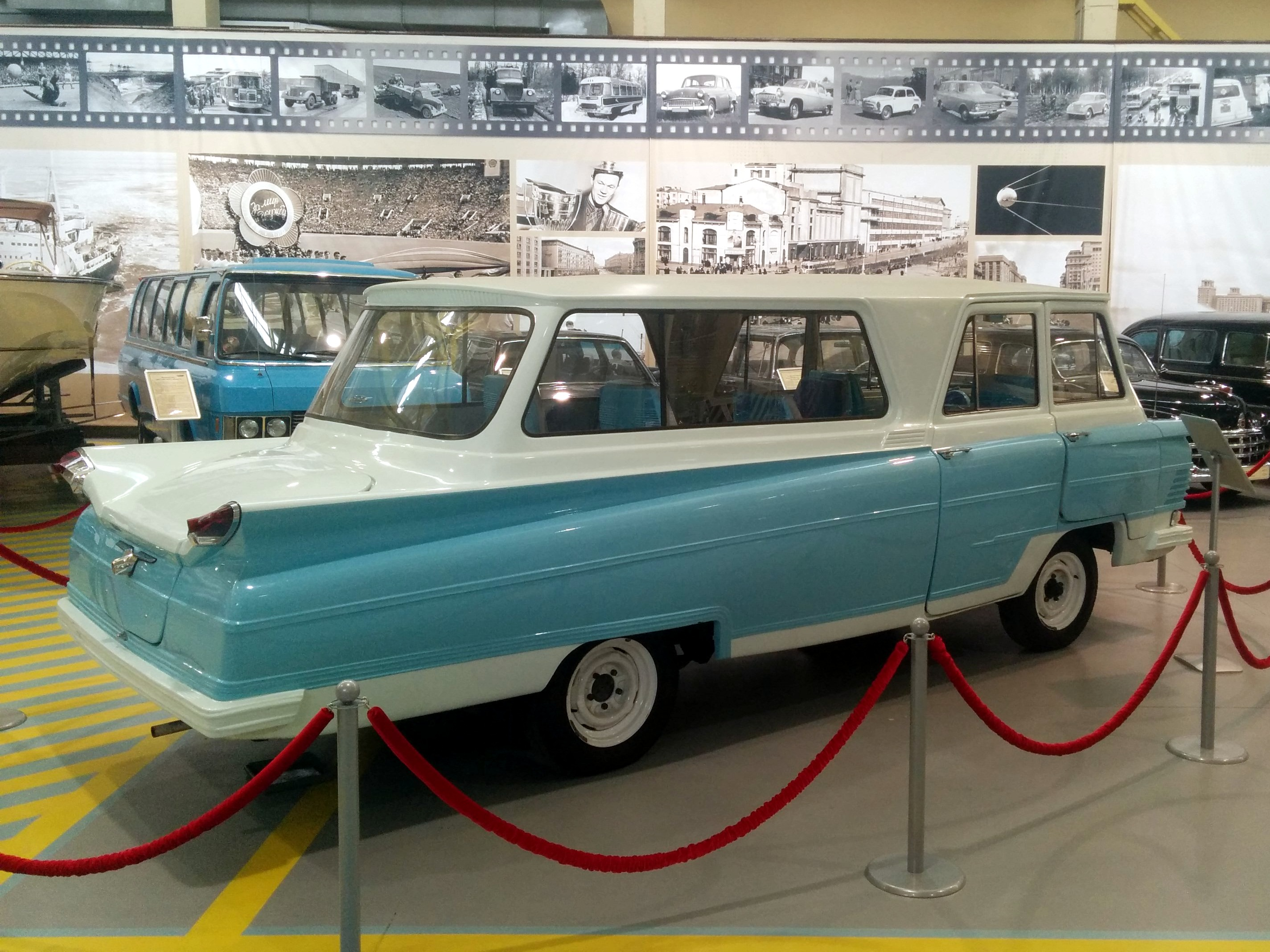 микроавтобус "Старт" в музее автомобильной техники Уральской горно-металлургической компании.